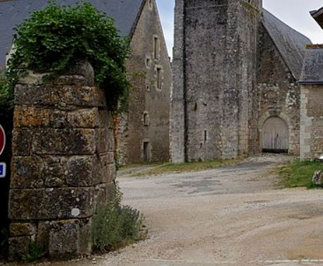 Pilier gauche du portail d'accès au prieuré du Louroux